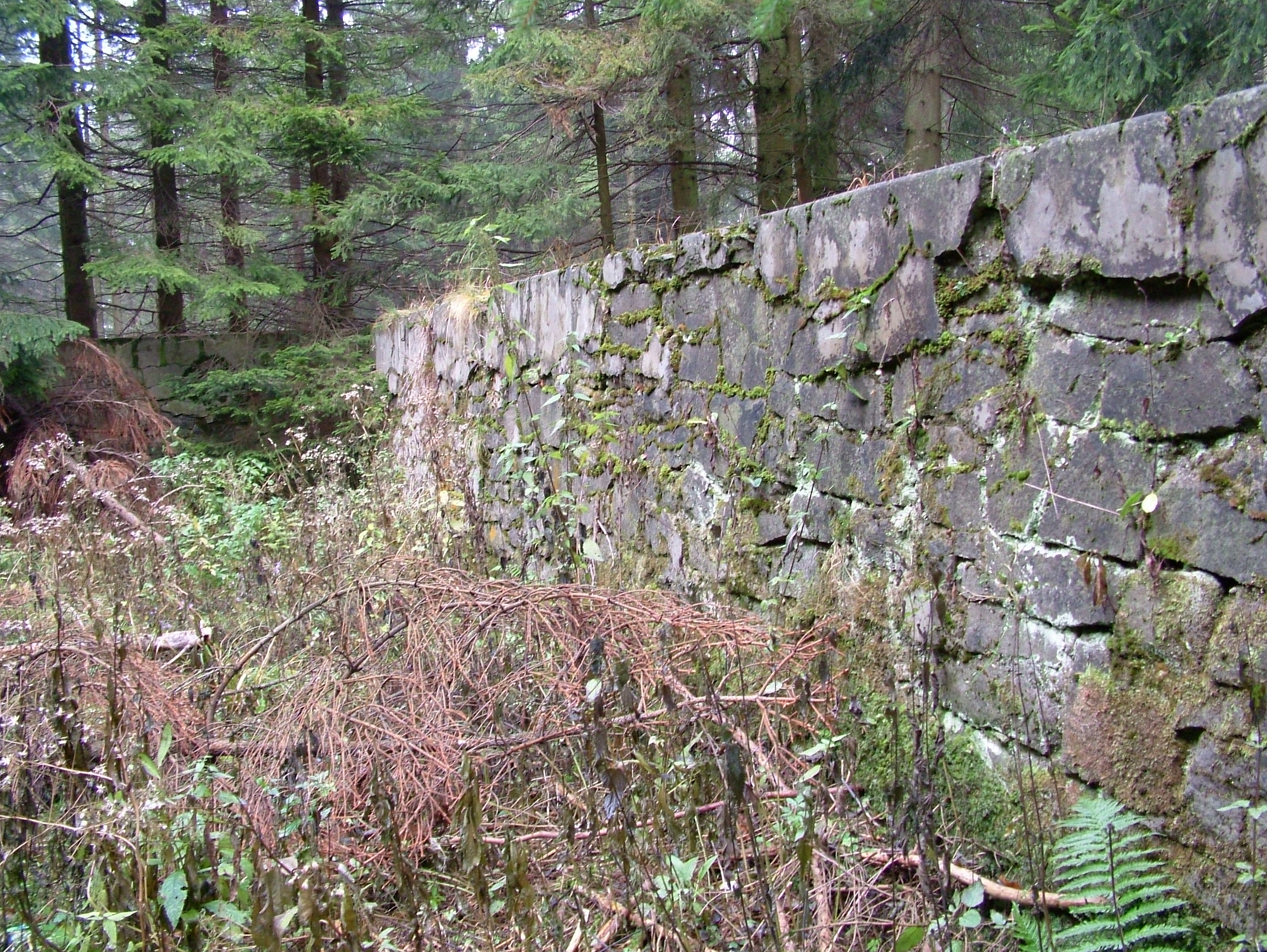 Ruiny basenu kapielowego na Magurze.jpg